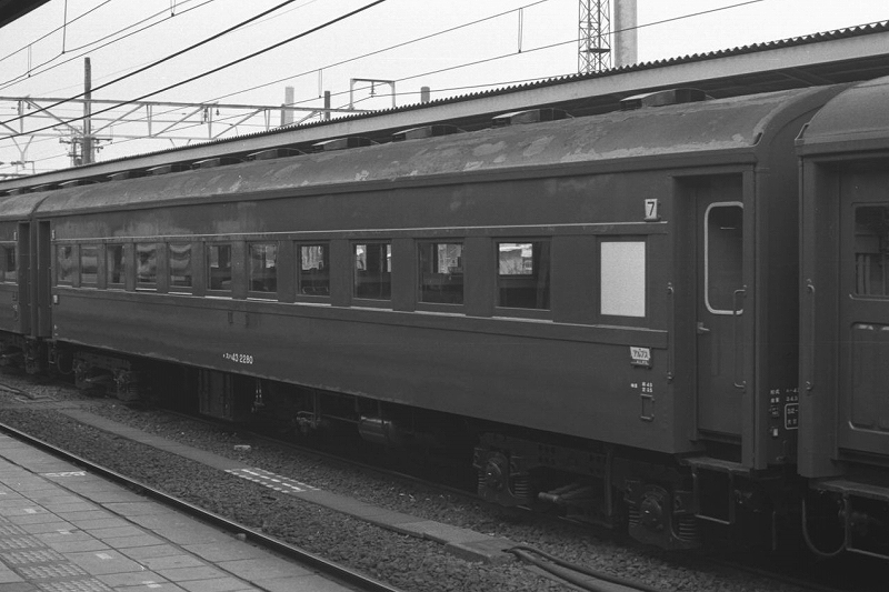 At Matsumoto Sta., Nagano. JNR Suha43 2280(スハ43 2280、松本駅にて。夜行アルプスに使用。）